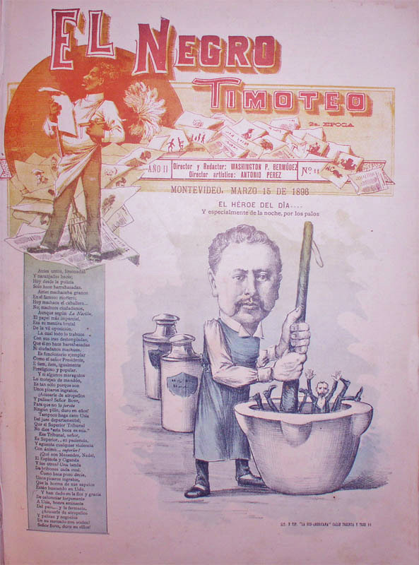 Portada de "En Negro Timoteo". 2da Época, año 2, nº 11.